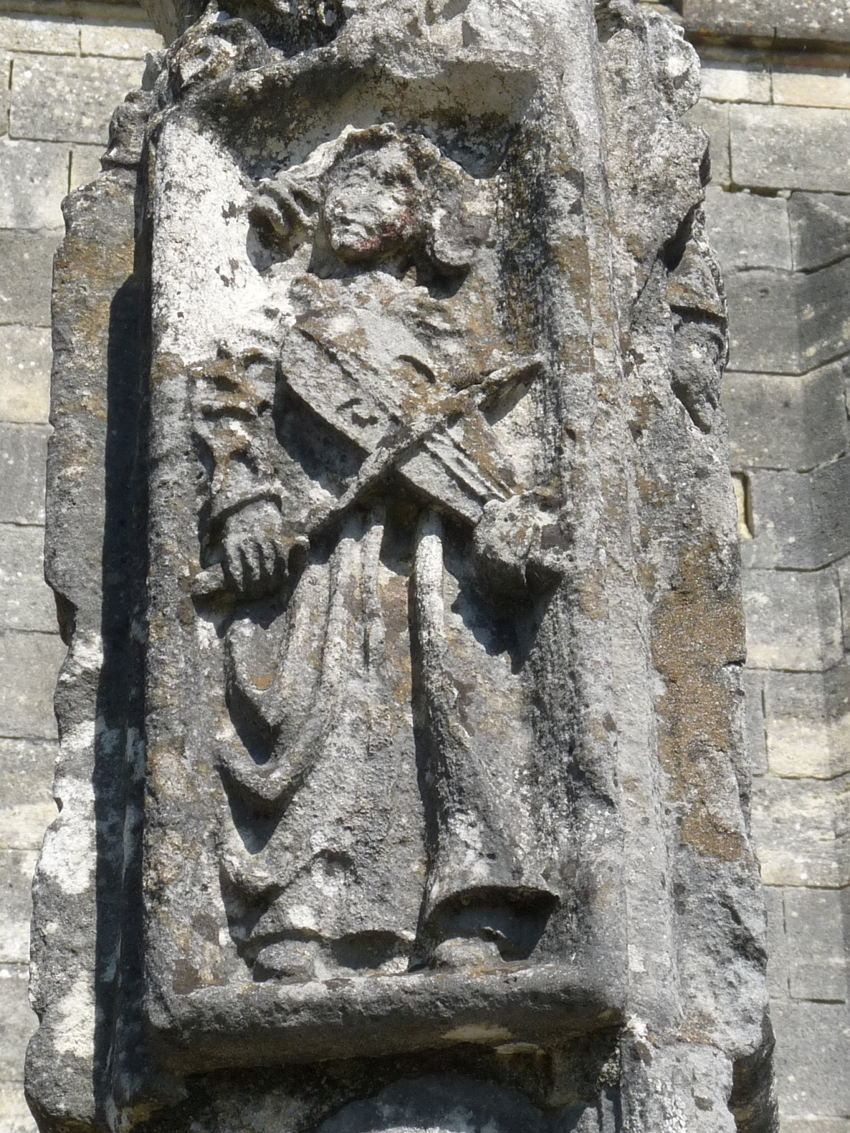 Musicien, croix de Bonzac, Gironde, France